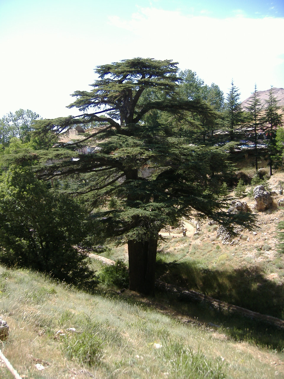 Cedrus libani var. libani, Lebanon.